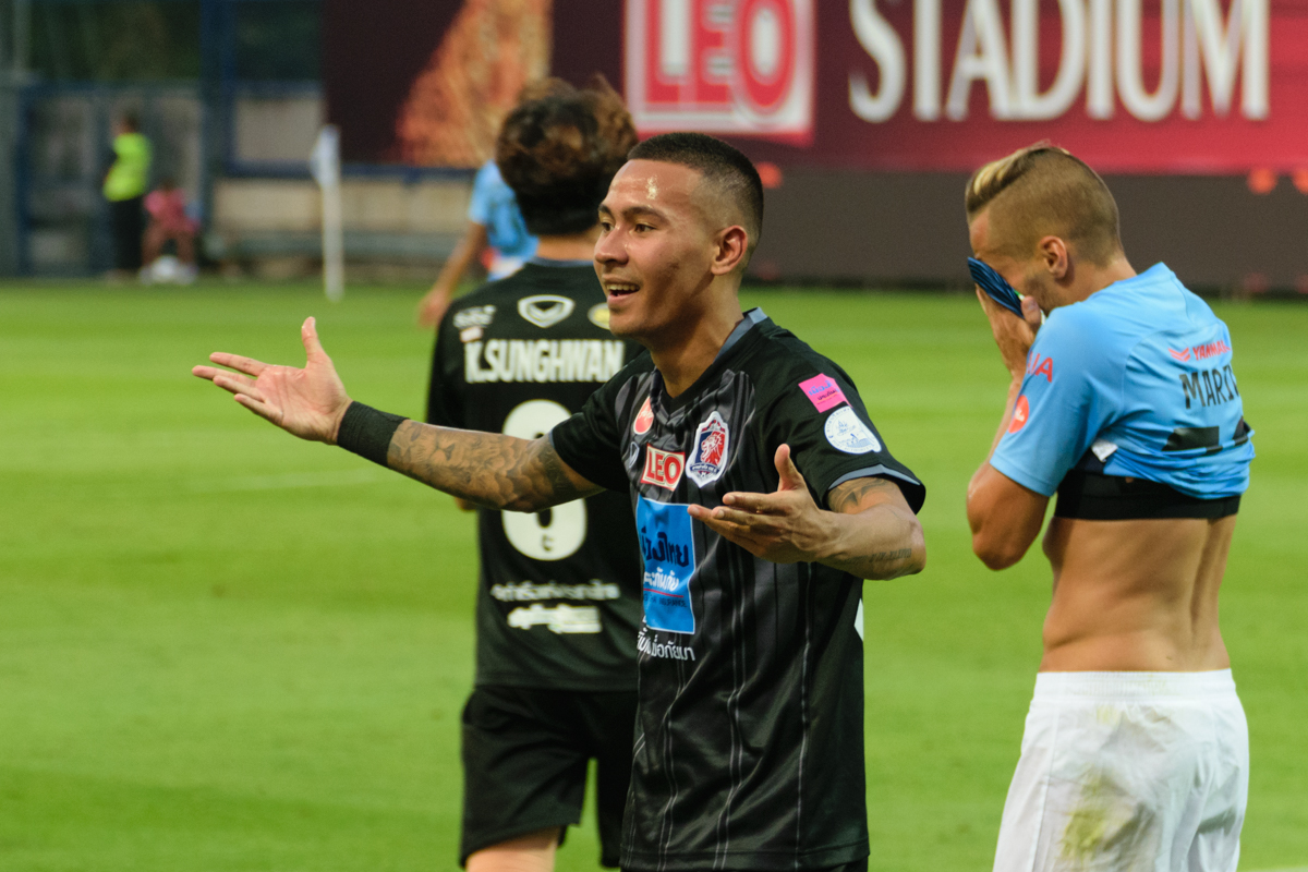 Kevin Deeromram